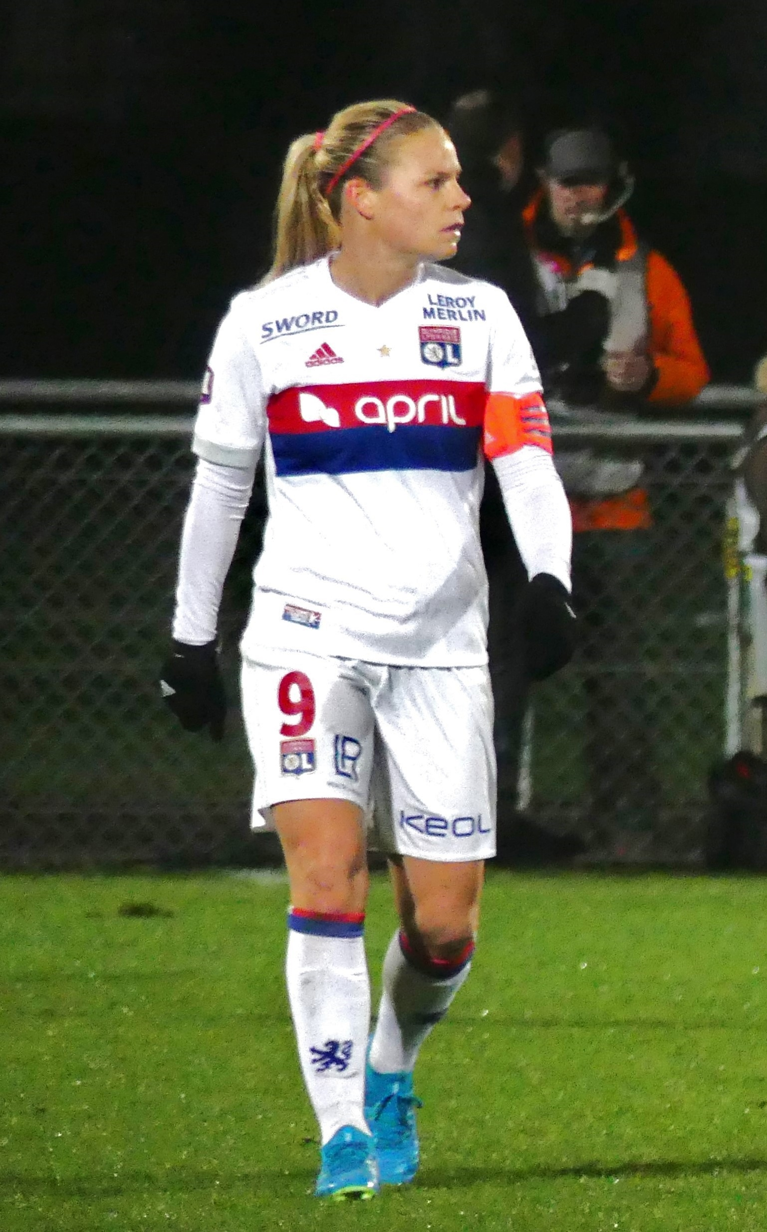 Eugénie Le Sommer le 6 février 2018 face à Montpellier en championnat.